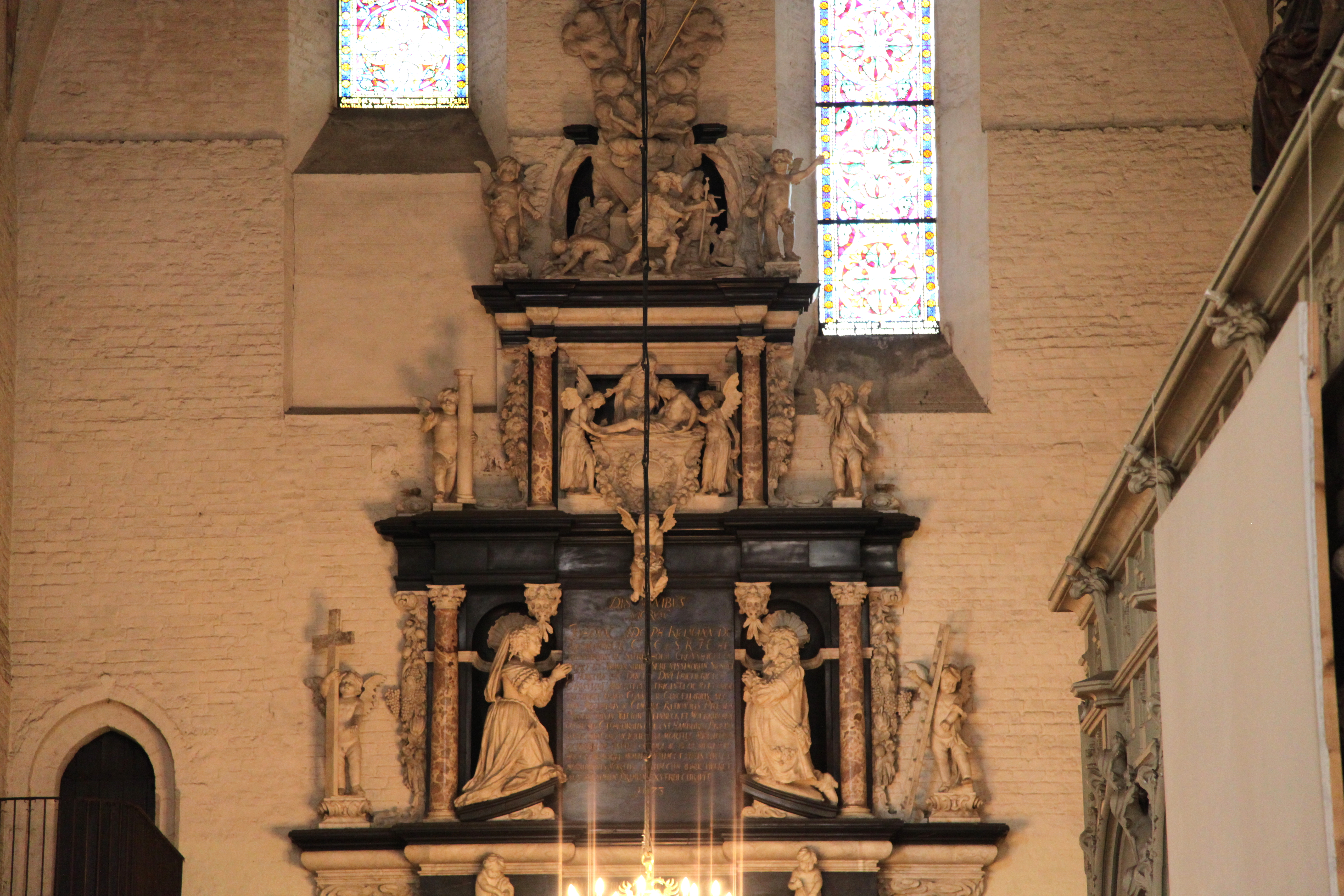 Im Dom in Schleswig